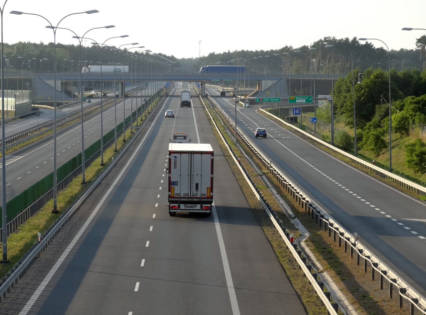 Południowa obwodnica Bydgoszczy w ciągu dróg ekspresowych S5 / S10, węzeł Białe Błota